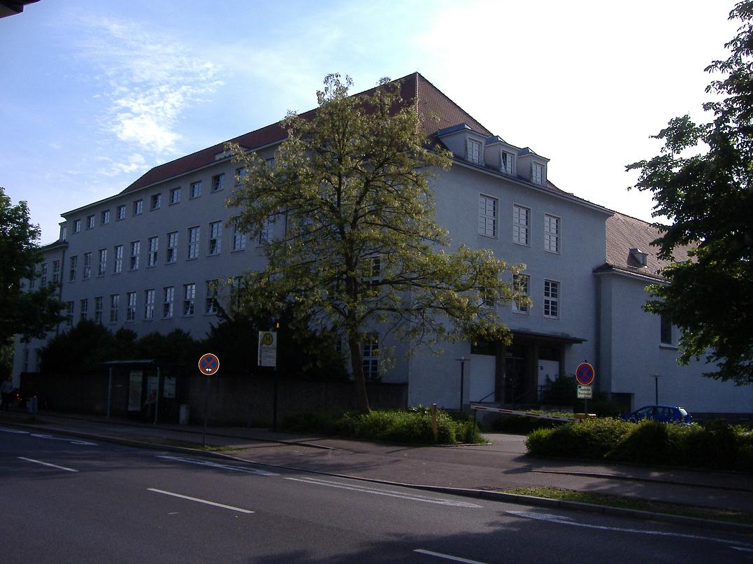 Das Steyler Haus, in dem die WFI untergebracht ist